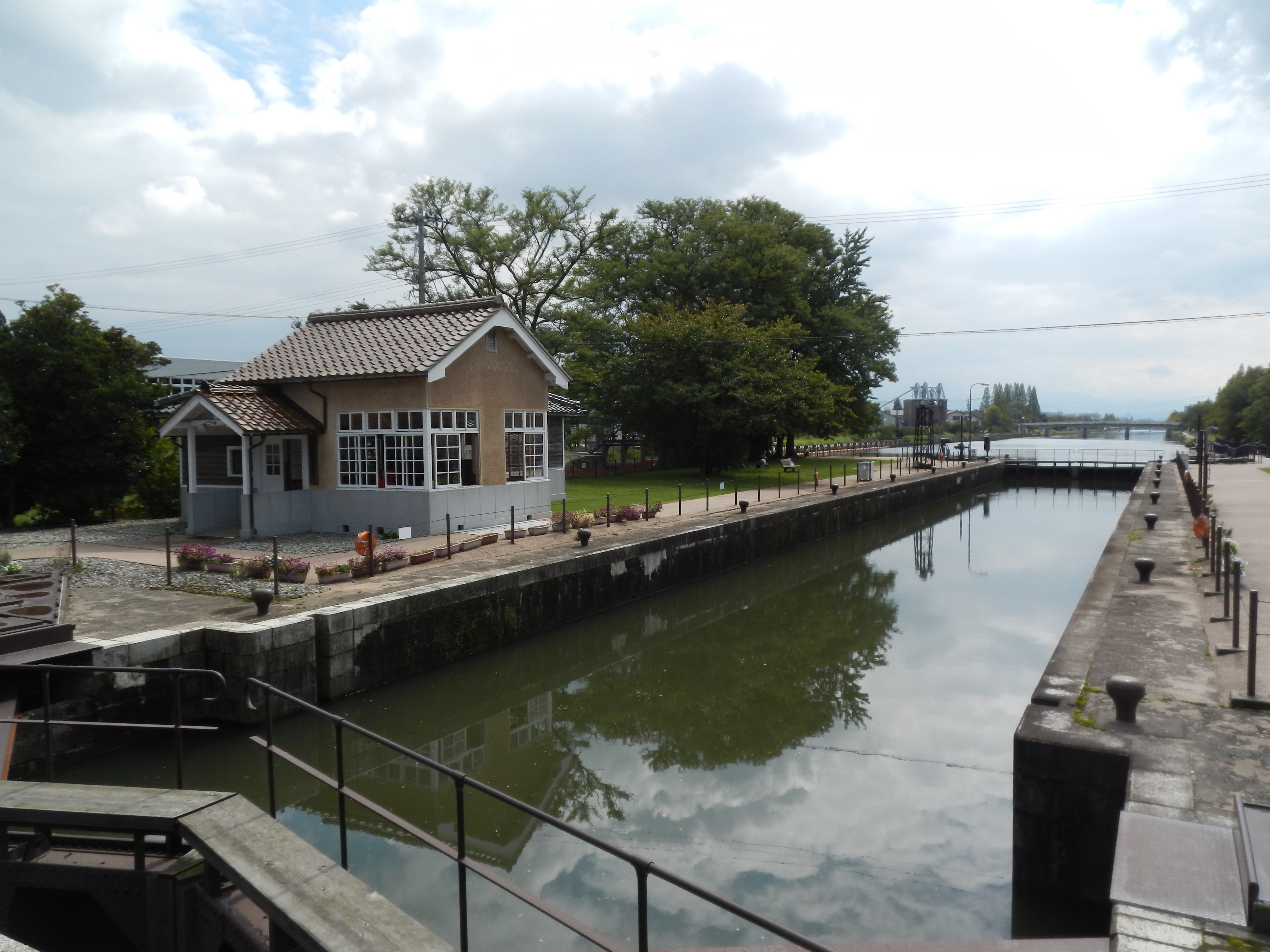 1 Kōjinmachi, Toyama-shi, Toyama-ken 930-0809, Japan